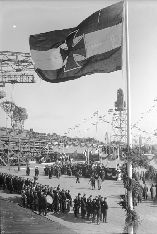 Die feierliche Taufe der 4 neuen deutschen Zerstörer "Tiger", "Lux", "Jagoa" und "Leopard", auf der Staatswerft in Wilhelmshaven! Die deutsche Marine-Kriegsflagge während der Taufe der 4 neuen deutschen Zerstörer.